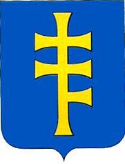 Herb miasteczka Tłuste z 1701